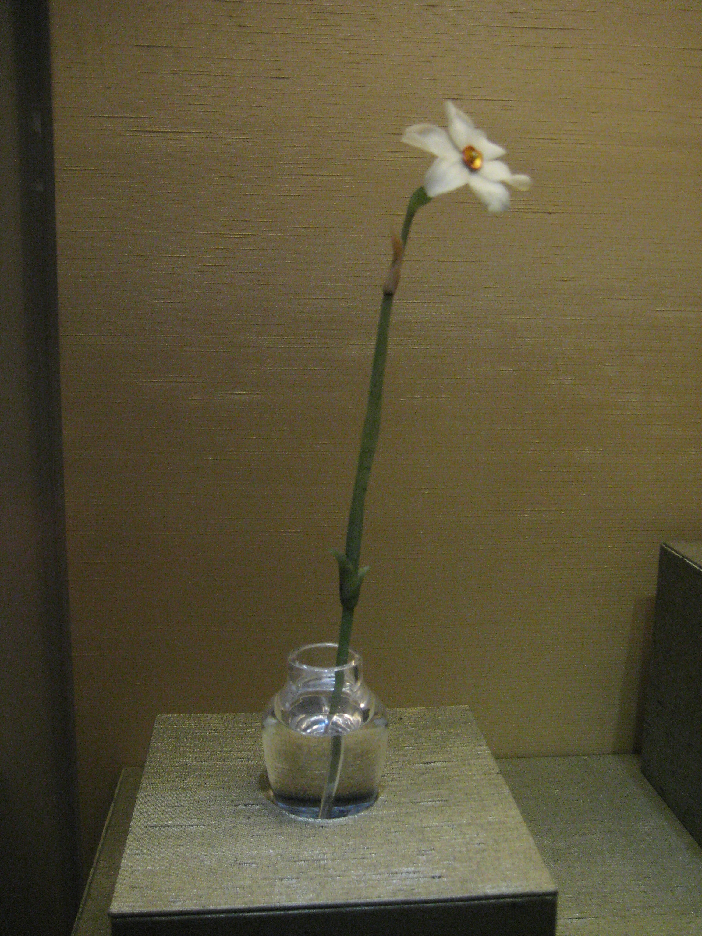 Нарцисс. Фирма Фаберже. СПб, ок. 1908. Кахолонг, нефрит, алмазы, горный хрусталь, золото. Поступил из собрания А.К. Рудановского. Эрмитаж